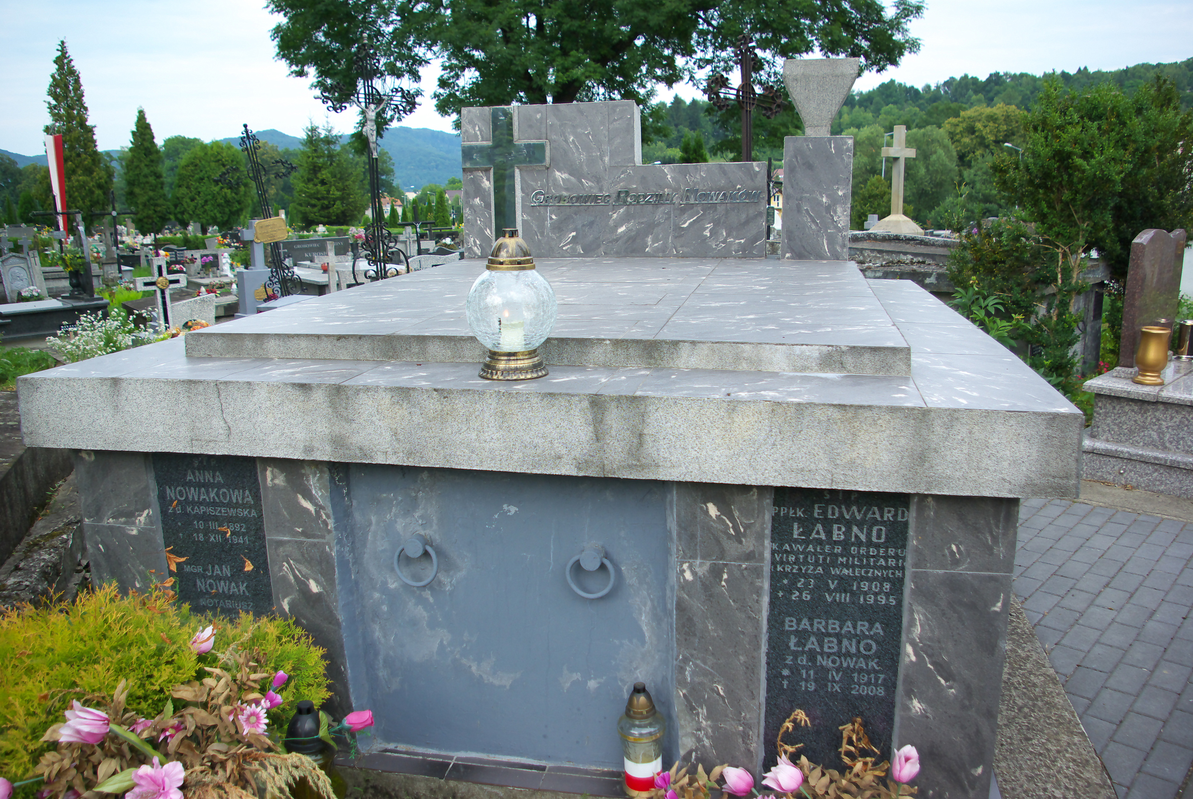 Grobowiec rodziny Nowak (w tym rodziny Łabno) na Cmentarzu Centralnym w Sanoku. Spoczywa Edward Łabno, kawaler Orderu Virtuti Militari